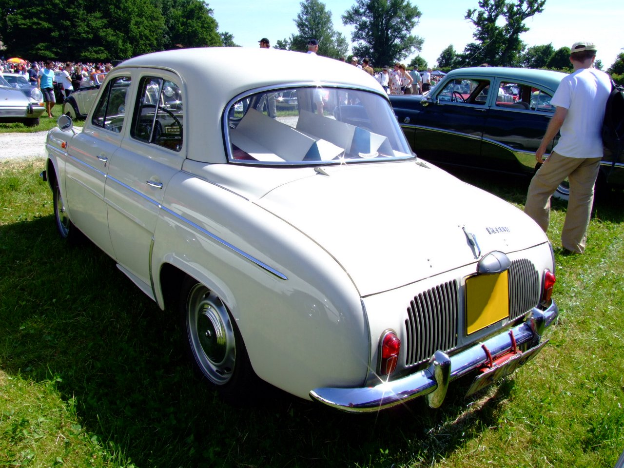 Renault DauphineGordini, Bj.: 1965, PS: 40